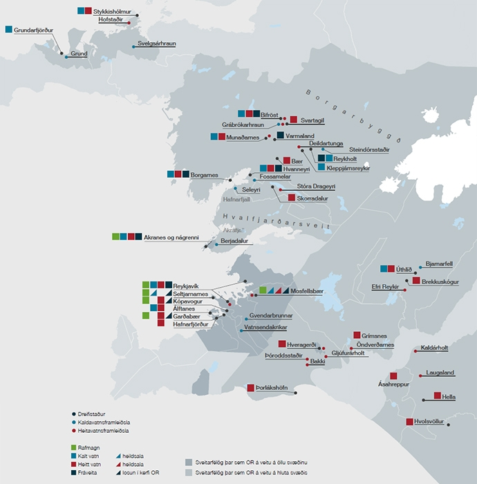 Starfssvæði Veitna er að mestu á höfuðborgarsvæðinu en einnig víða á Suður- og Vesturlandi.